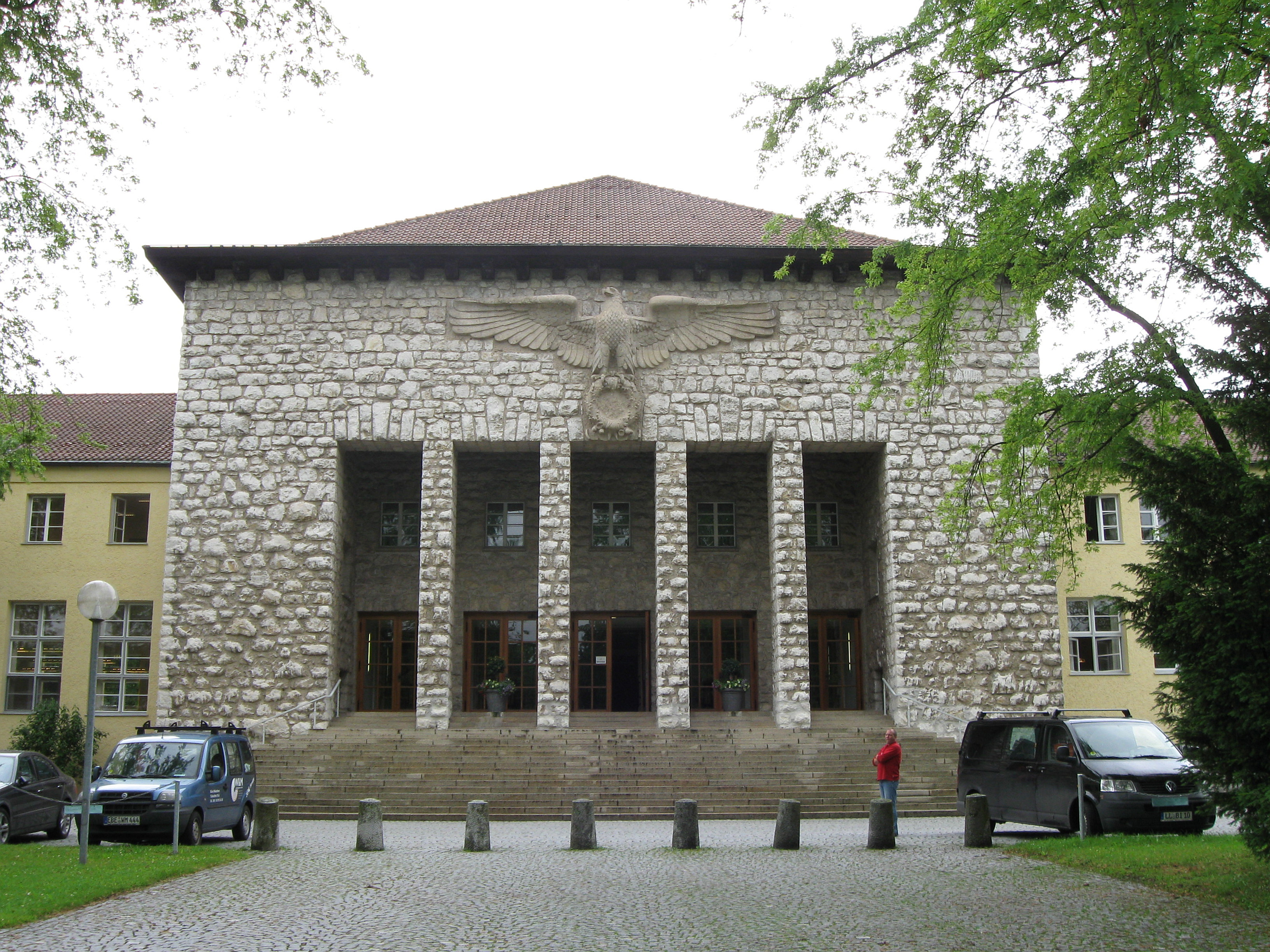 "Finanzschule" Herrsching, Eingangshalle - Musterbeispiel der NS-Architektur